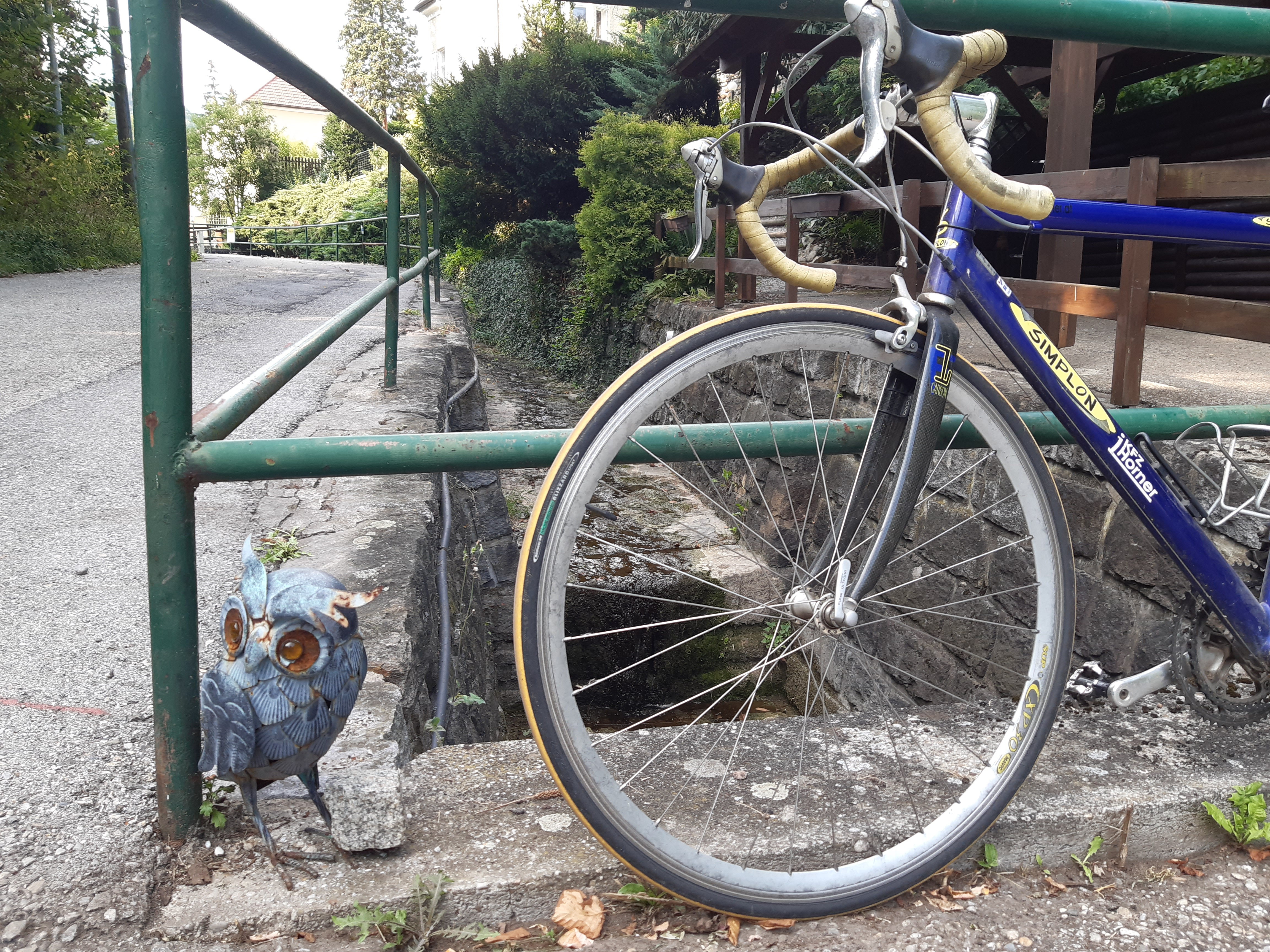 Eule aus Metall neben einem Rennrad